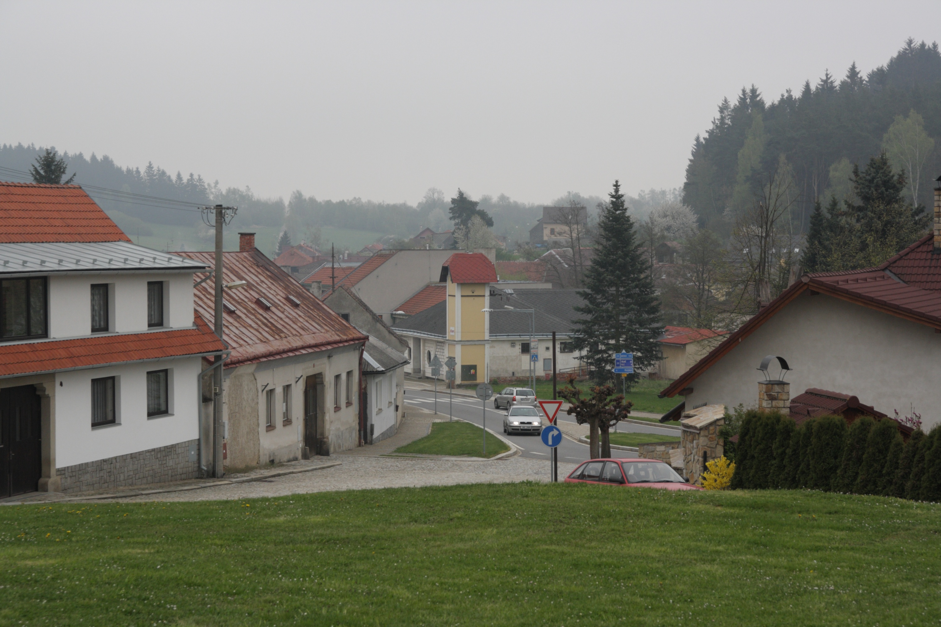 Mrákotín (okr. Jihlava) - hlavní silnice od kostela.